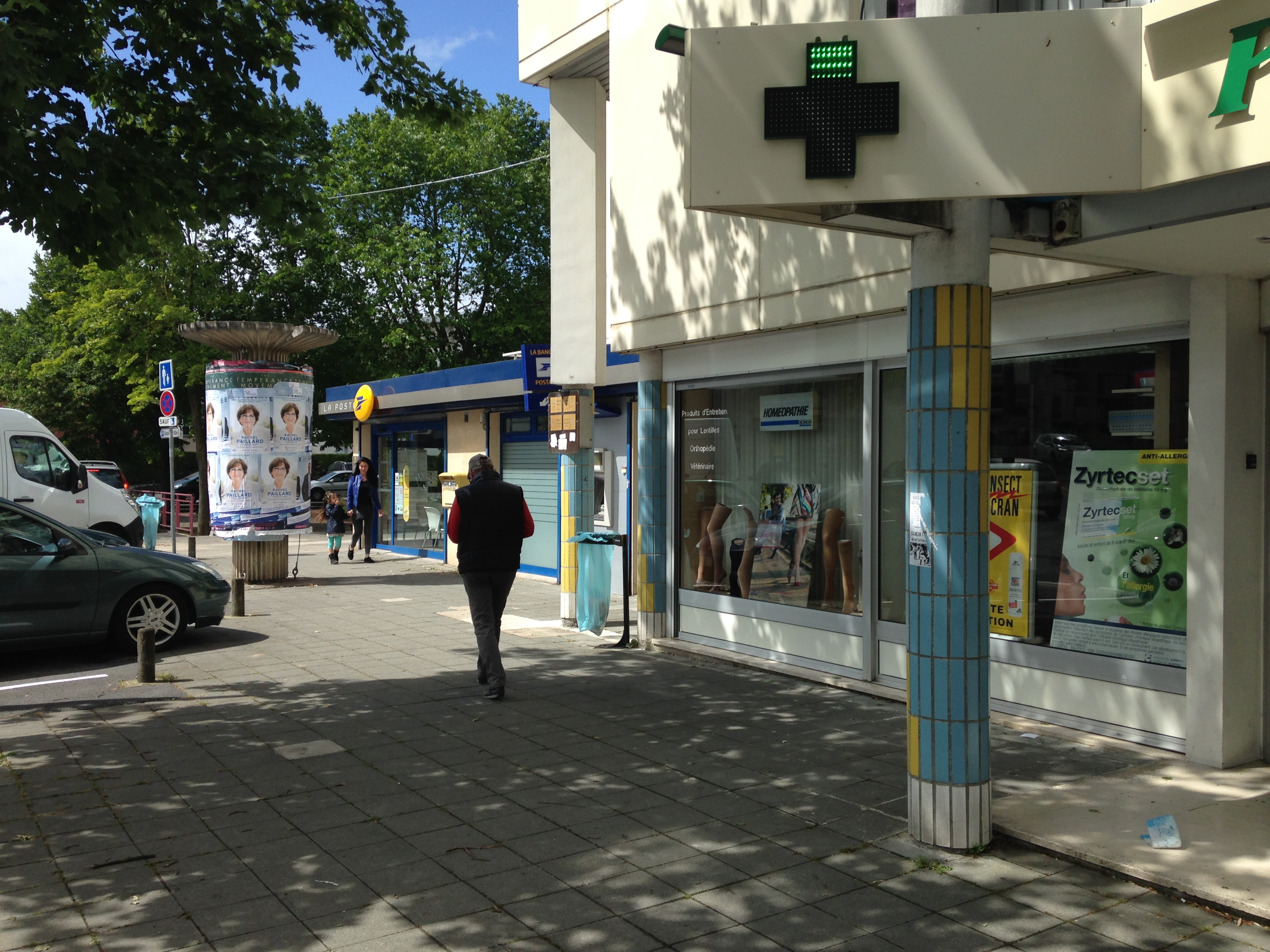 Illustration de la place René Clair (actuel)